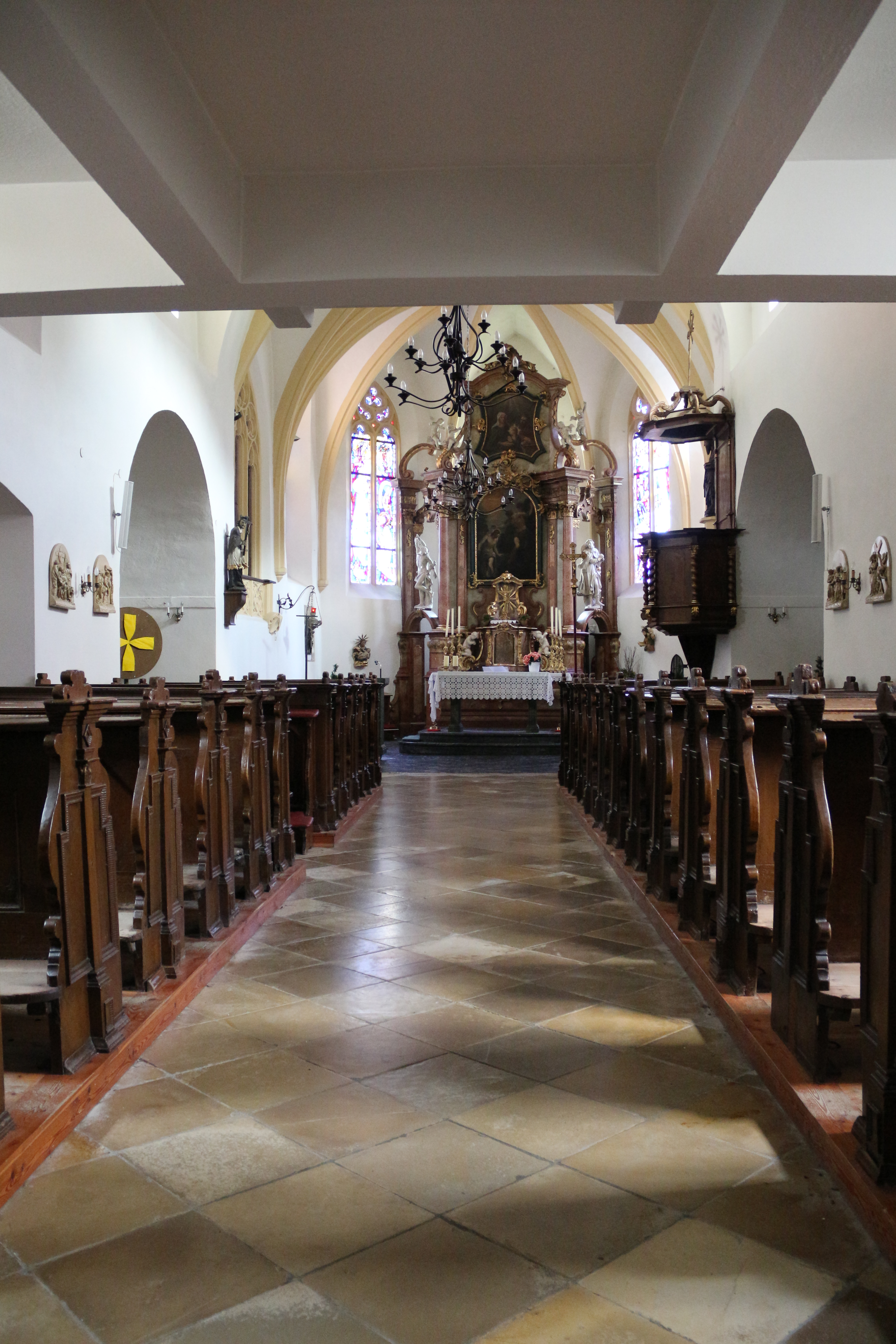 Kath. Pfarrkirche hl. Johannes der Täufer in Gutenstein, Niederösterreich.